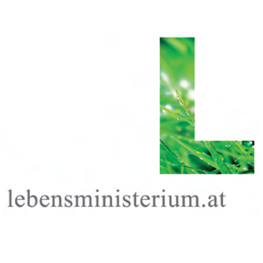 Logo des "Bundesministerium für Land- und Forstwirtschaft, Umwelt und Wasserwirtschaft"